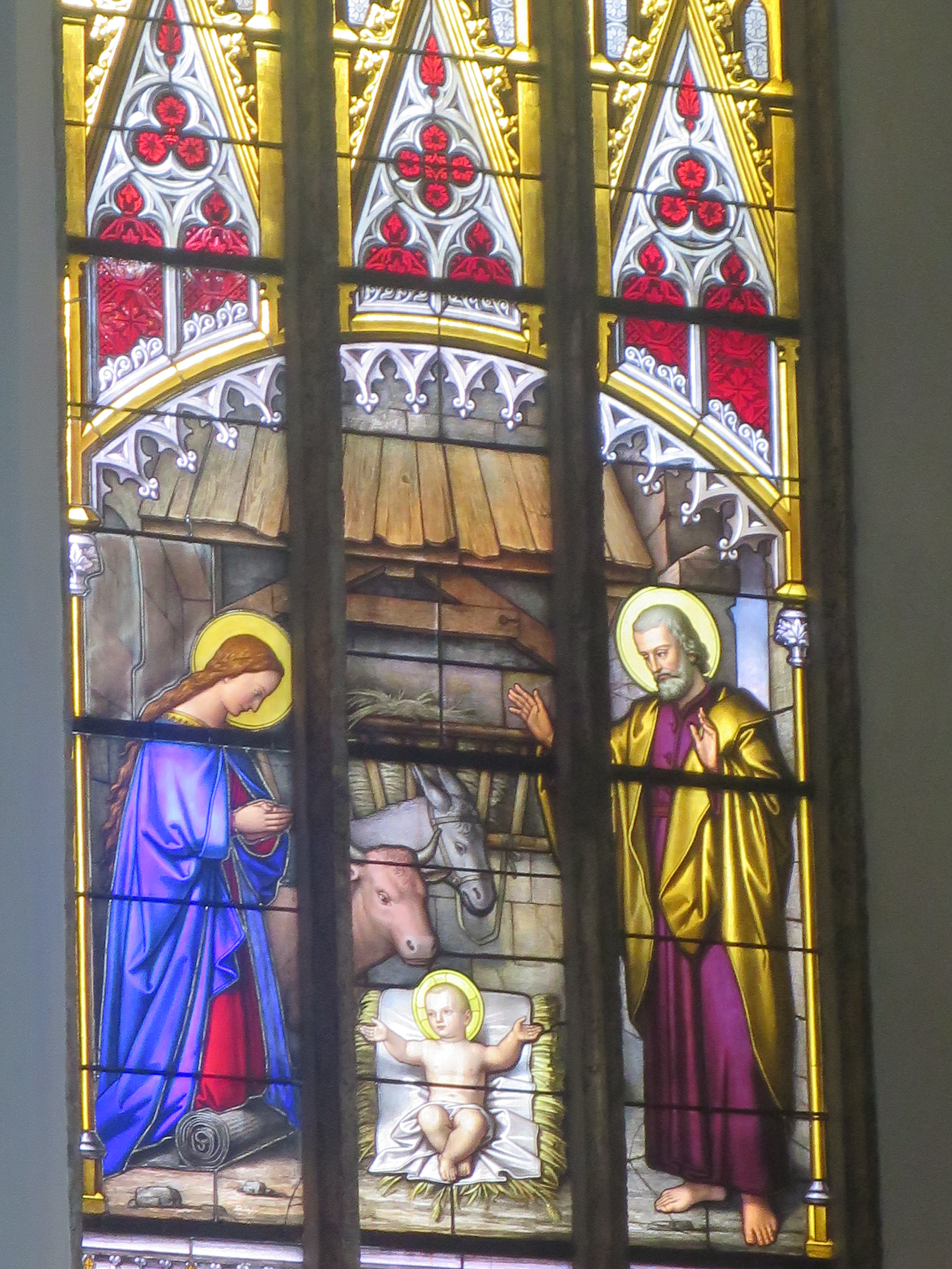 Glasgemälde im Chorraum links (Weihnachten).